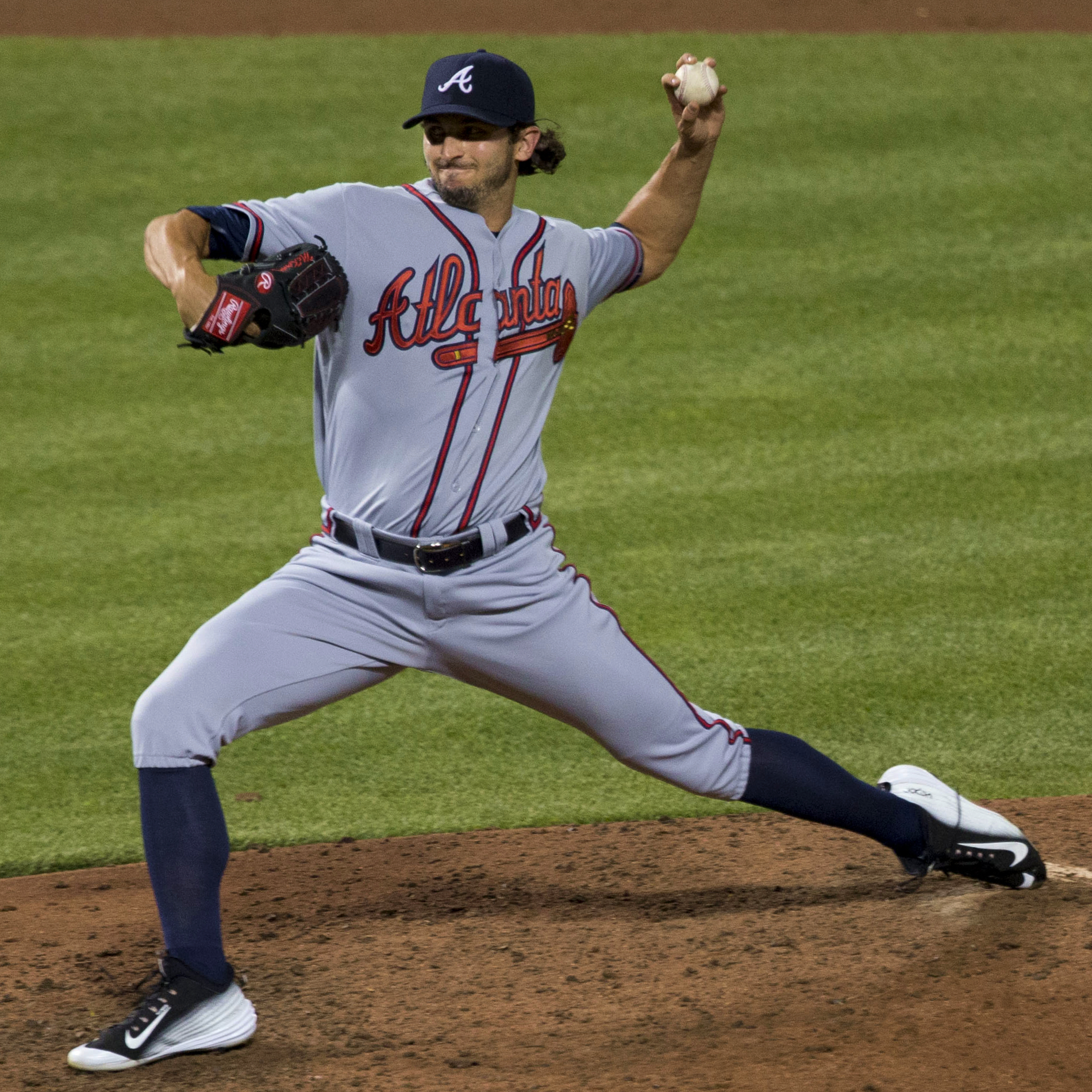 Andrew McKirahan